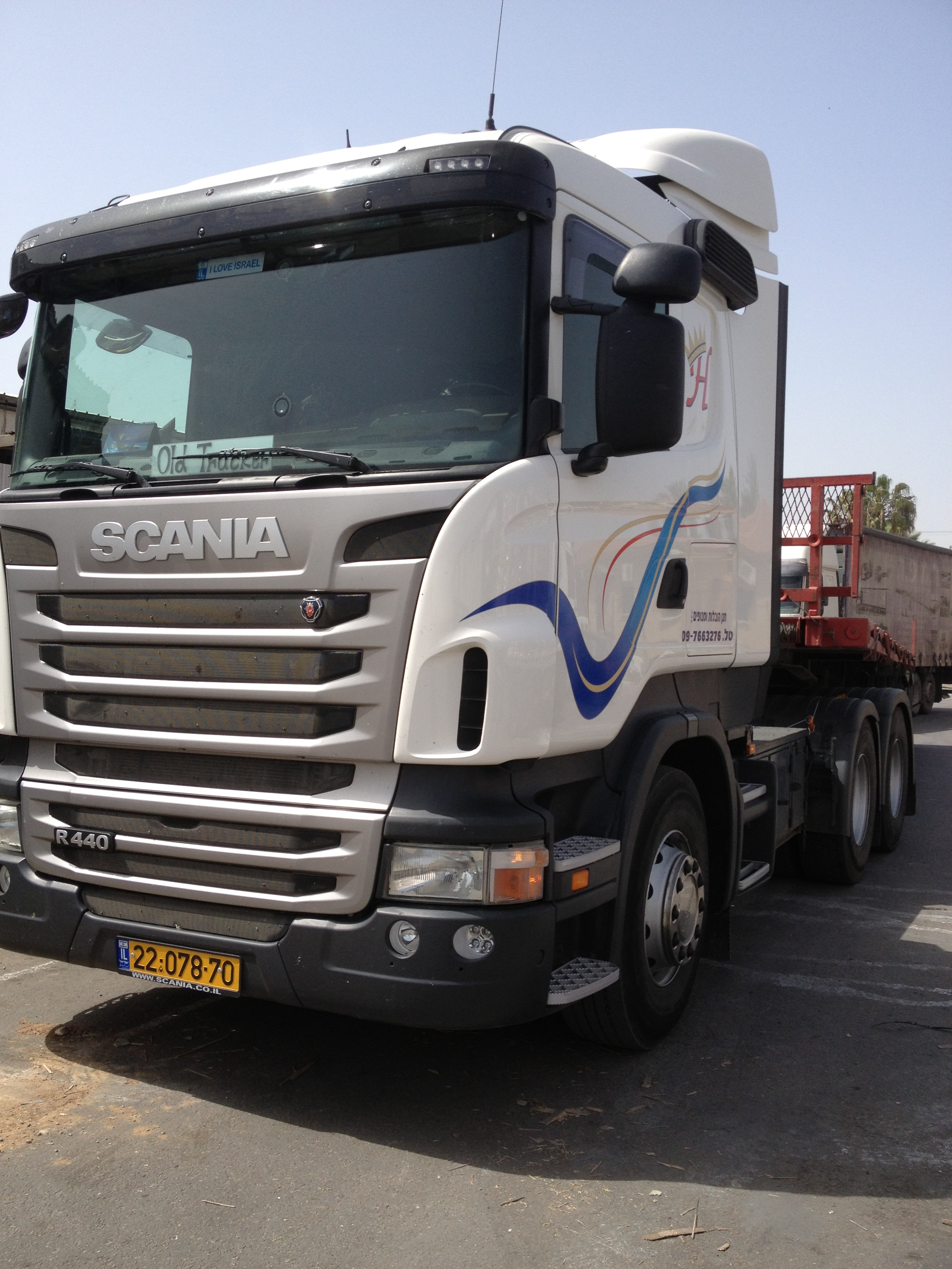 סקאניה של חנן